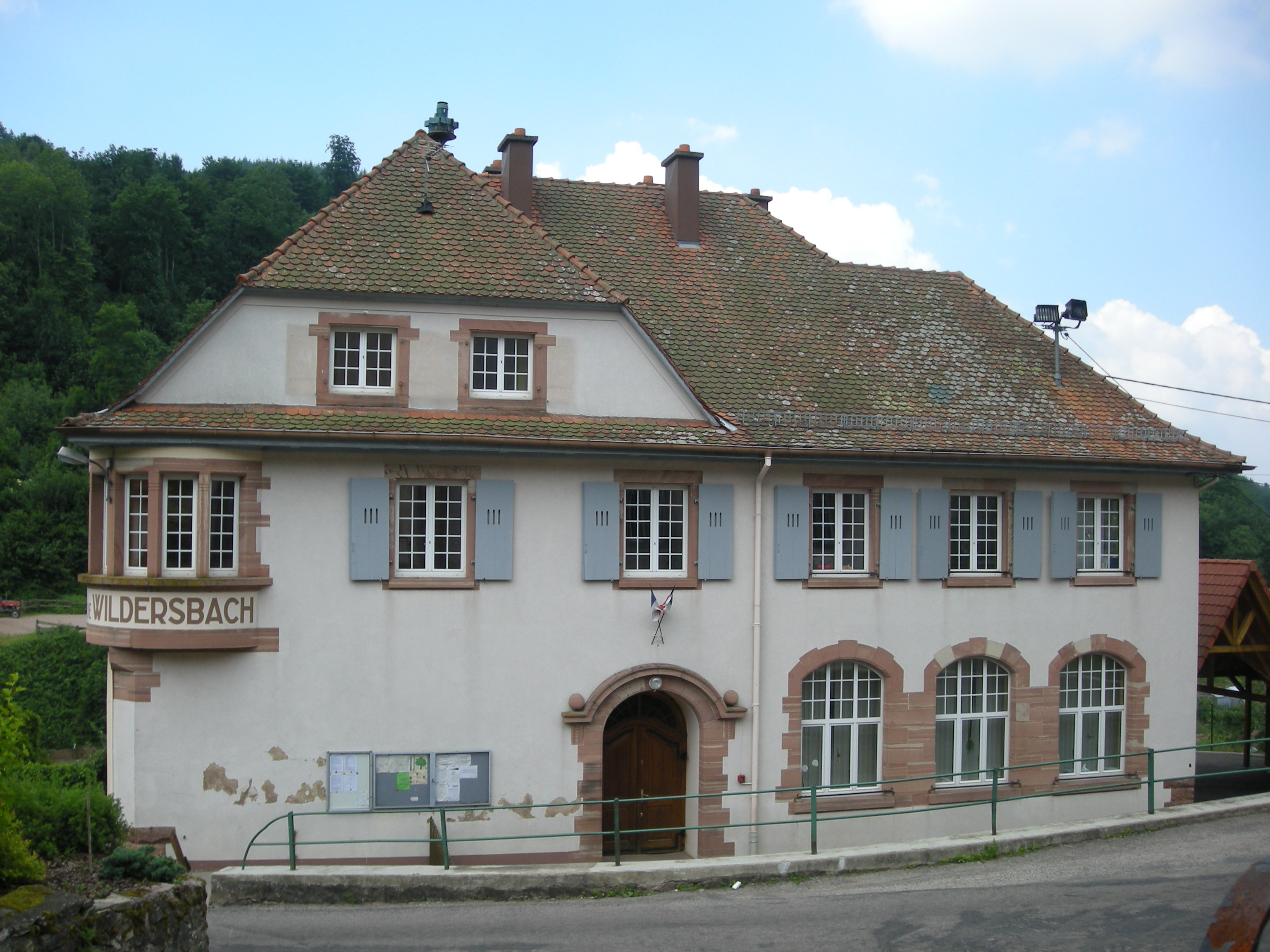 Mairie-école de Wildersbach (Bas-Rhin)